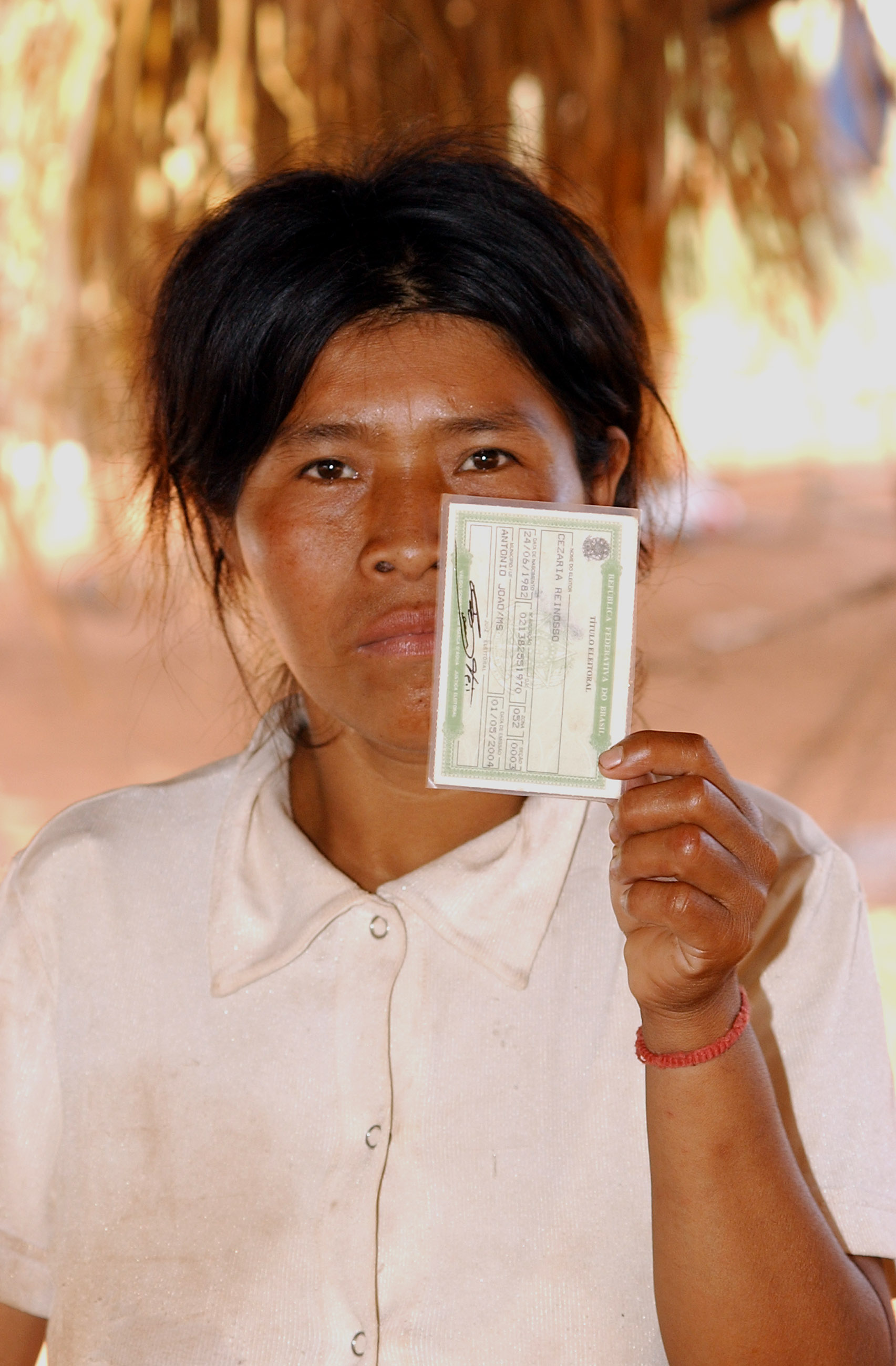 Uma índia Guarani-Kaiowá mostra seu título de eleitor no município de Antônio João (Mato Grosso do Sul).